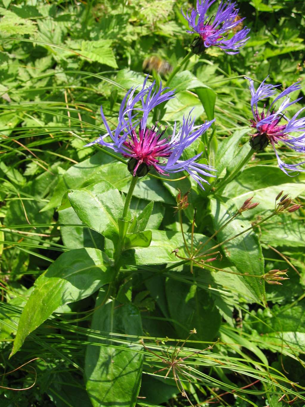 Berg-Flockenblume (Centaurea montana). Fundort: Nähe Hofalm, Spital am Pyhrn, Österreich; Aufgenommen von Benutzer:Tigerente am 07.08.2004; Lizenz: GNU-FDL